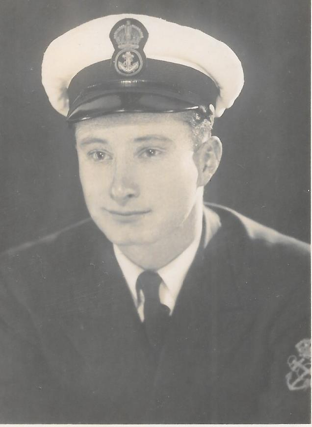 רס"ר אדם ענב בצי המלכותי הבריטי 1942